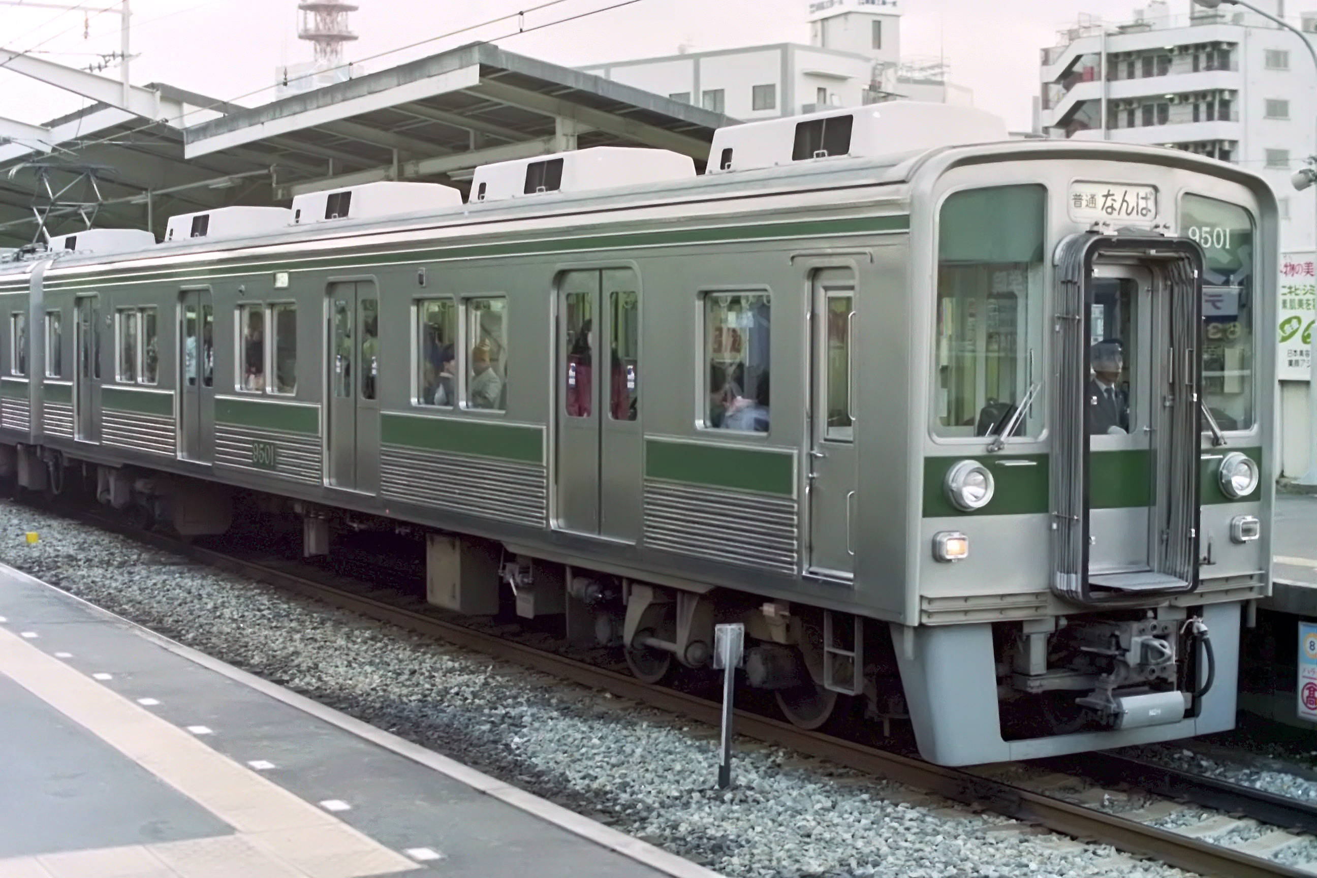 南海9000系 旧塗装